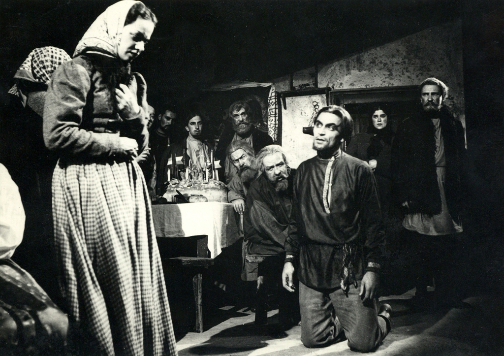 Lev Nikolajevič Tolstoj, Moč teme ali Komur prst pomoliš, hoče celo roko, Drama SNG v Ljubljani. Na fotografiji v ospredju: Vika Gril (Marina), Fran Lipah (Akim), Bert Sotlar (Nikita), Ivan Jerman (Marinin mož).